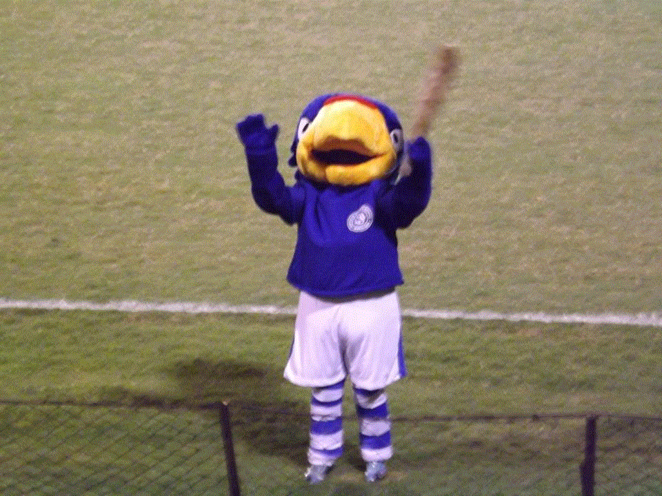 Foto do Tira-Prosa, mascote do Esporte Clube São Bento, Abril de 2013